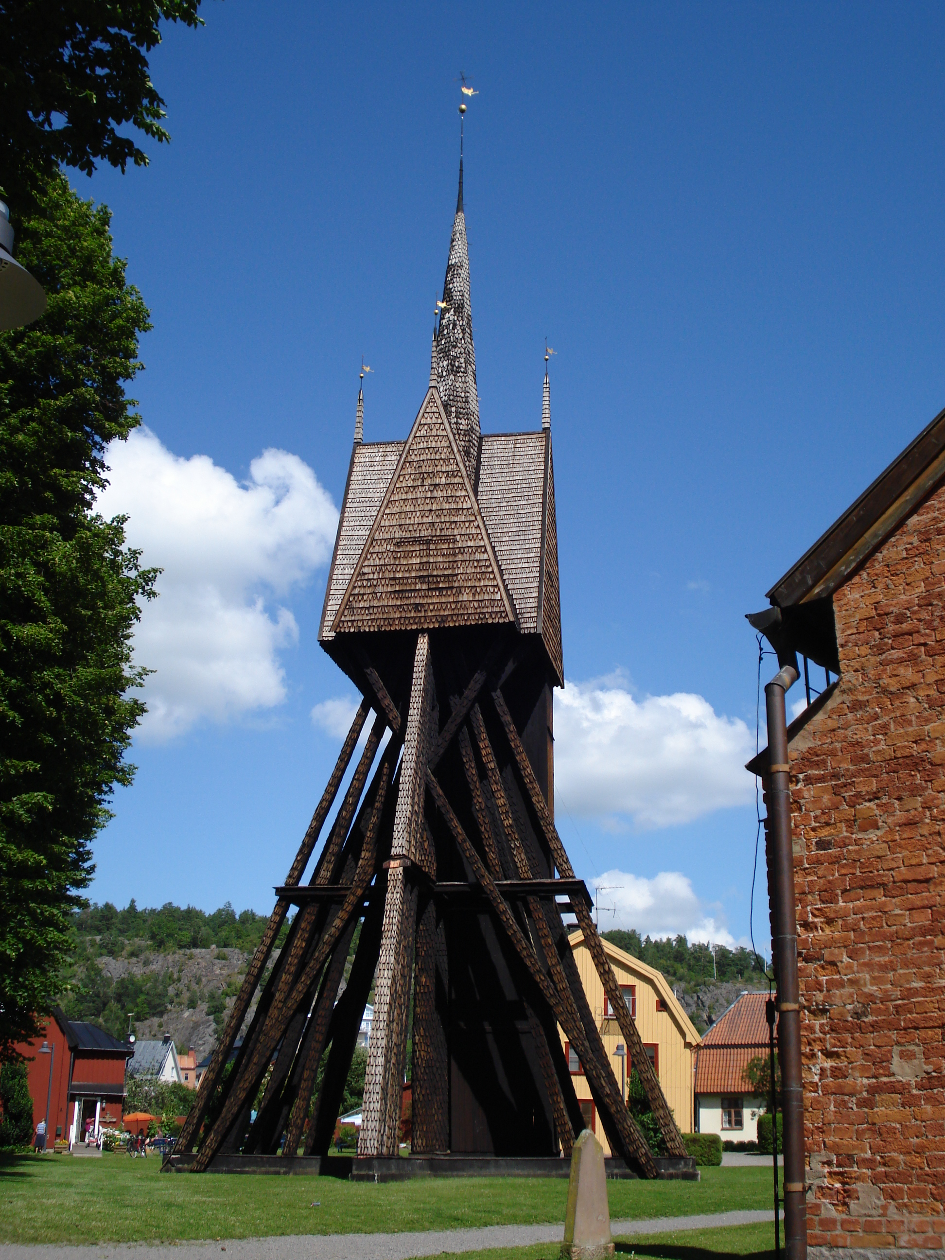 Klockstapel vid Sankt Laurentii kyrka, Söderköping.